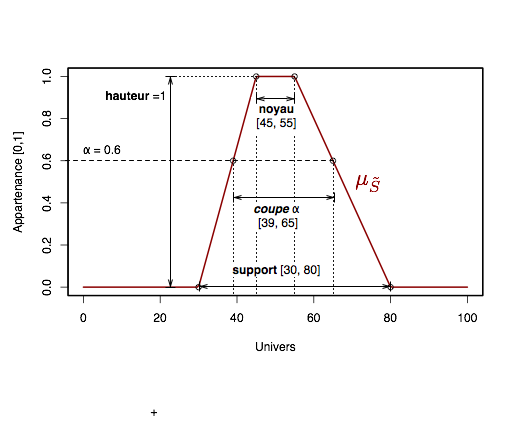 Illustre les différents attributs d'un ensemble flou, noyau, hauteur, support, coupe-alpha